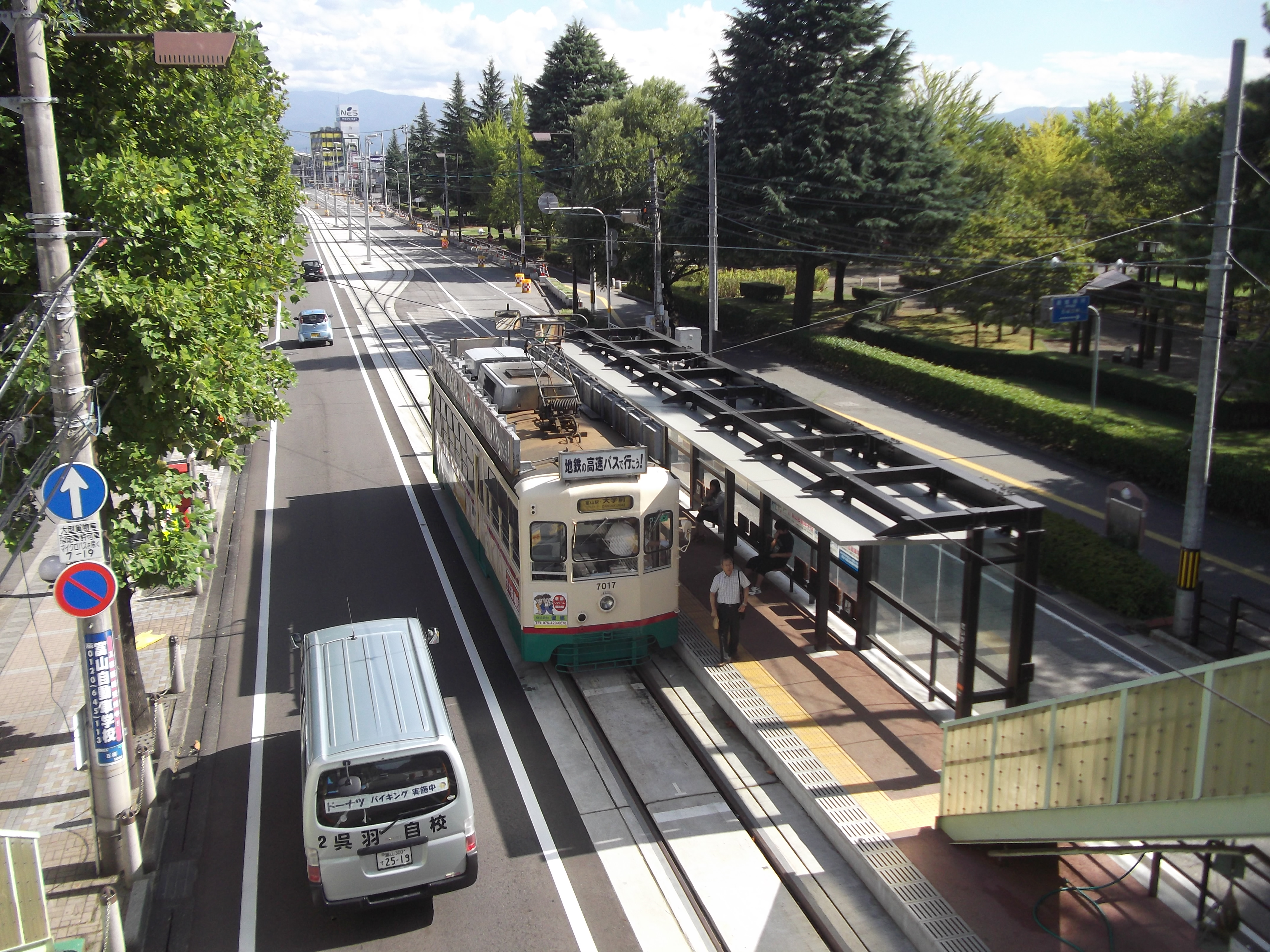 富山市内軌道線大学前駅